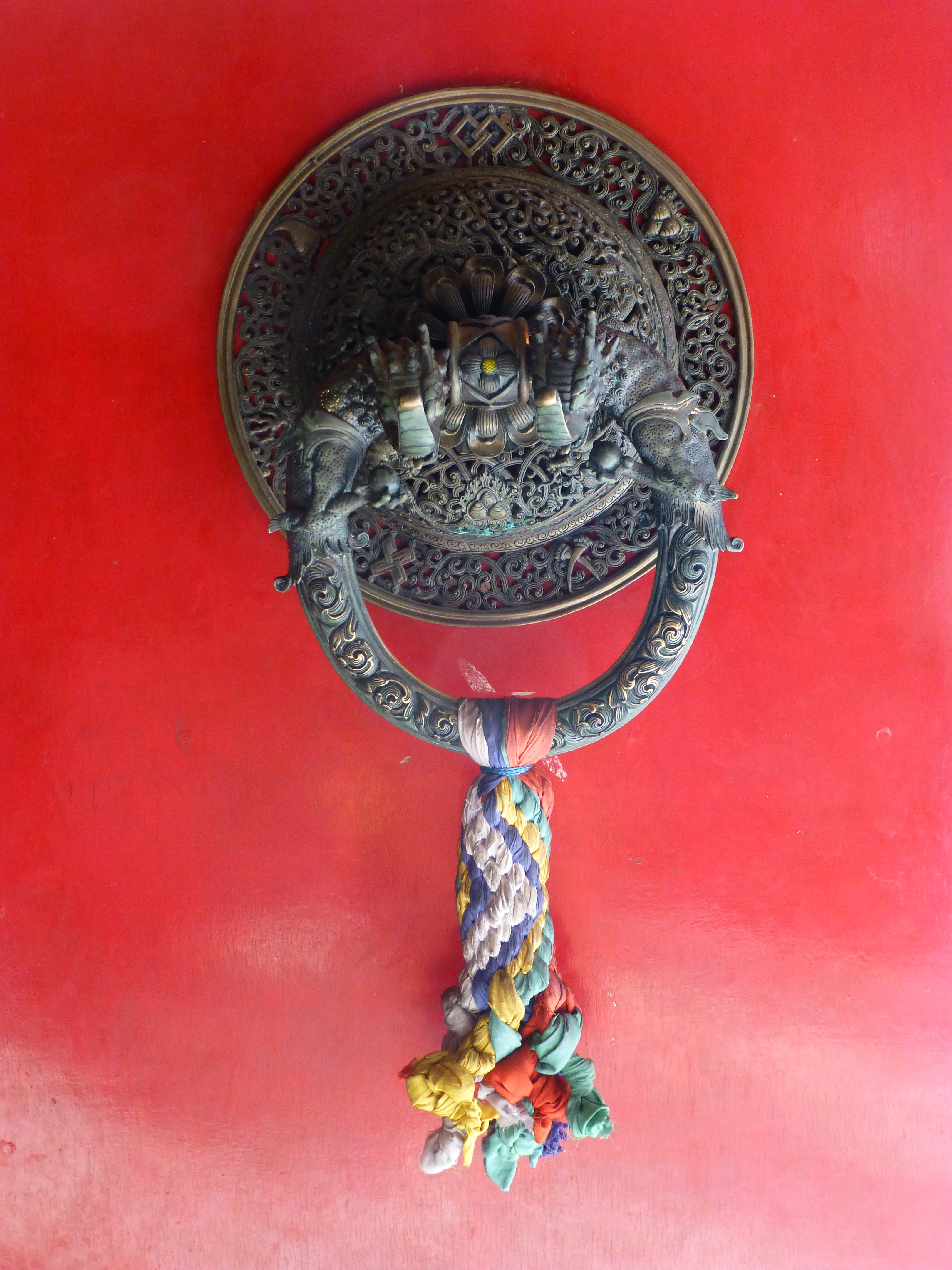 90 Door Pull, Tibetan Temple, Bodhgaya